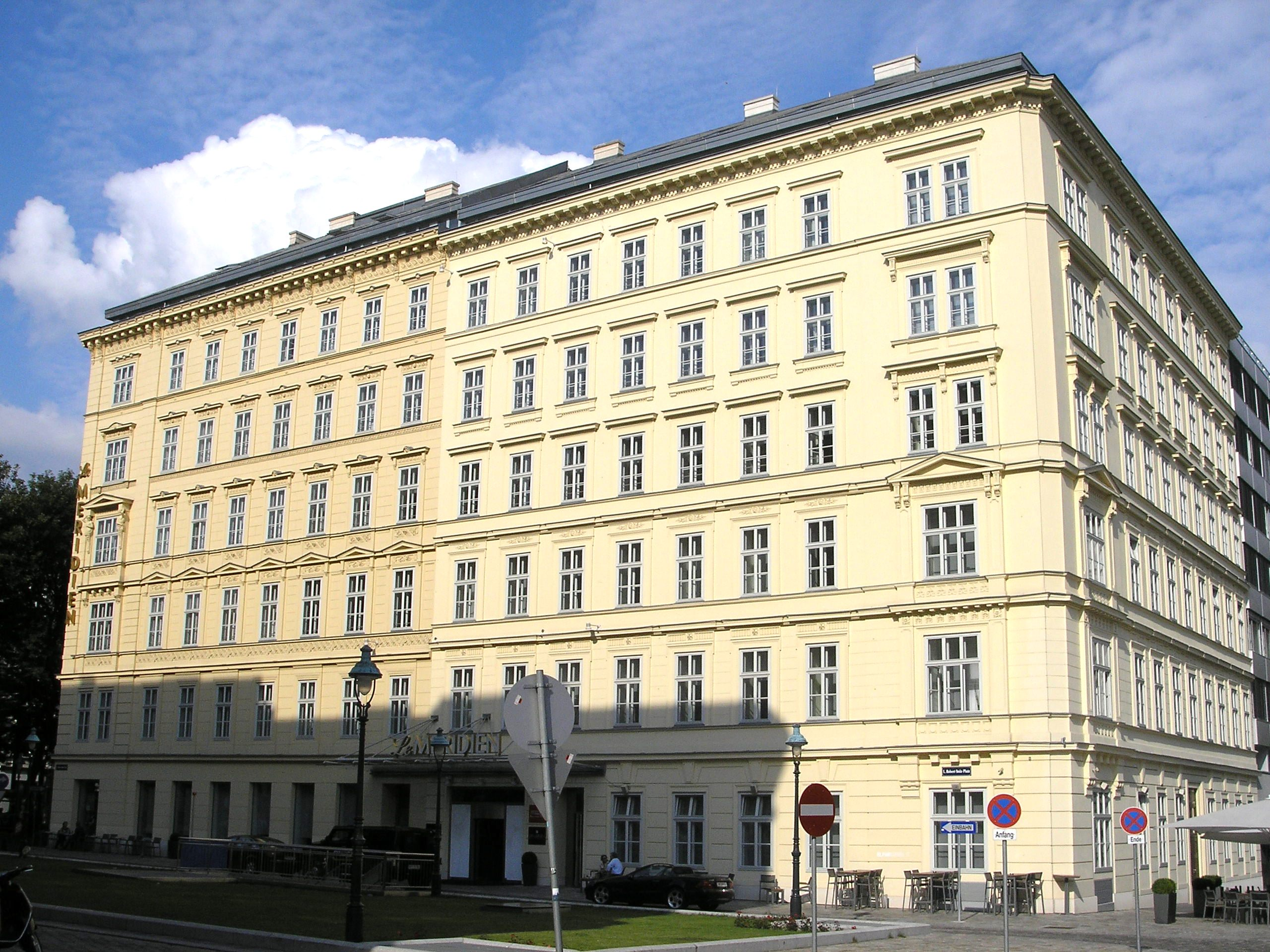 The hotel Le Meridien in Vienna.